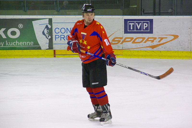 Jerzy Sobera w barwach Polonii Bytom podczas meczu na Mistrzostwach Polski Oldboyów w Sanoku (Arena Sanok, 2012)